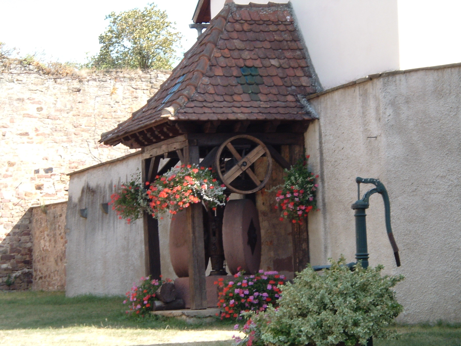 Photo prise par Morgan DONNARD Pressoir de la mairie